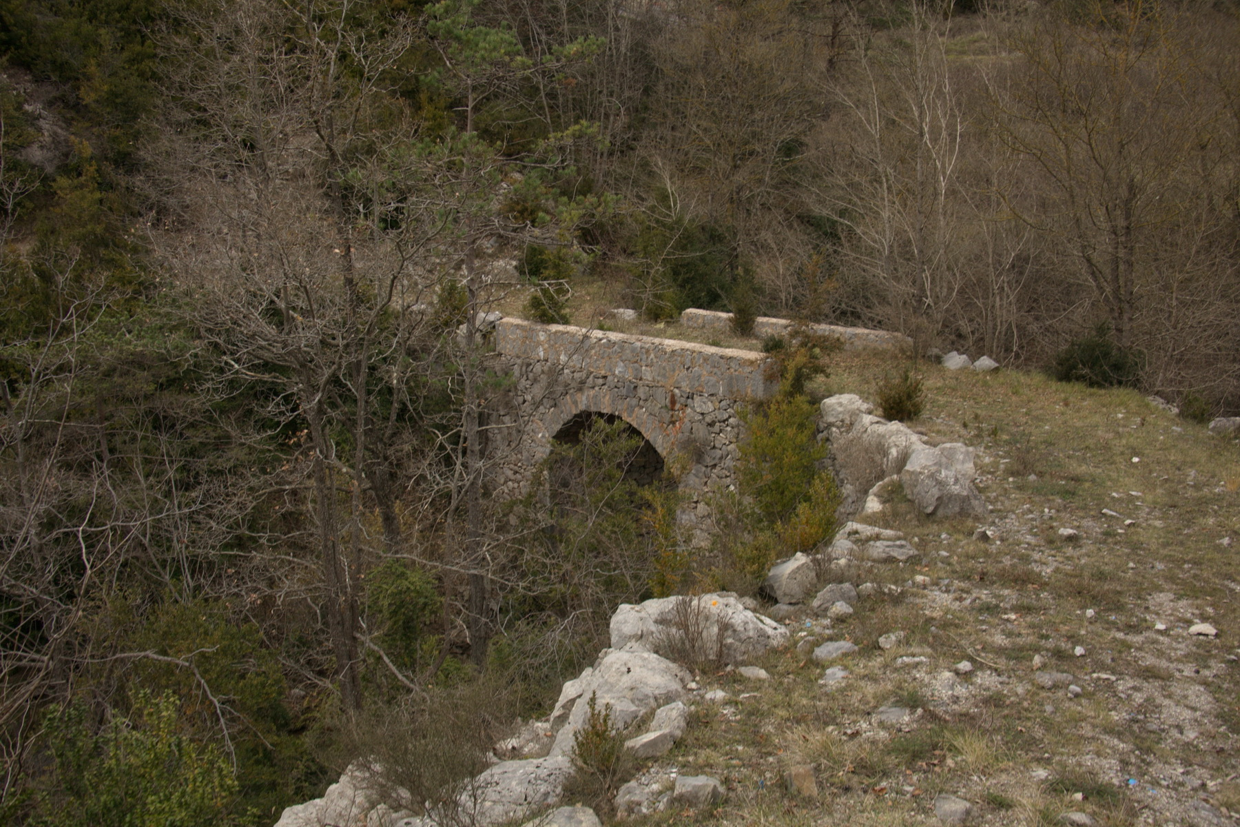 Pont de la Foradada (Gombrèn)